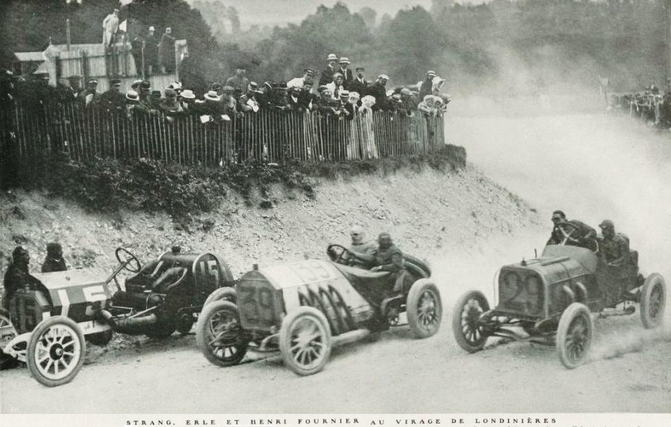 Virage de Londinières, au Grand Prix de l'A.C.F. 1908 - La Vie au Grand Air, le 18 juillet 1908, p.53